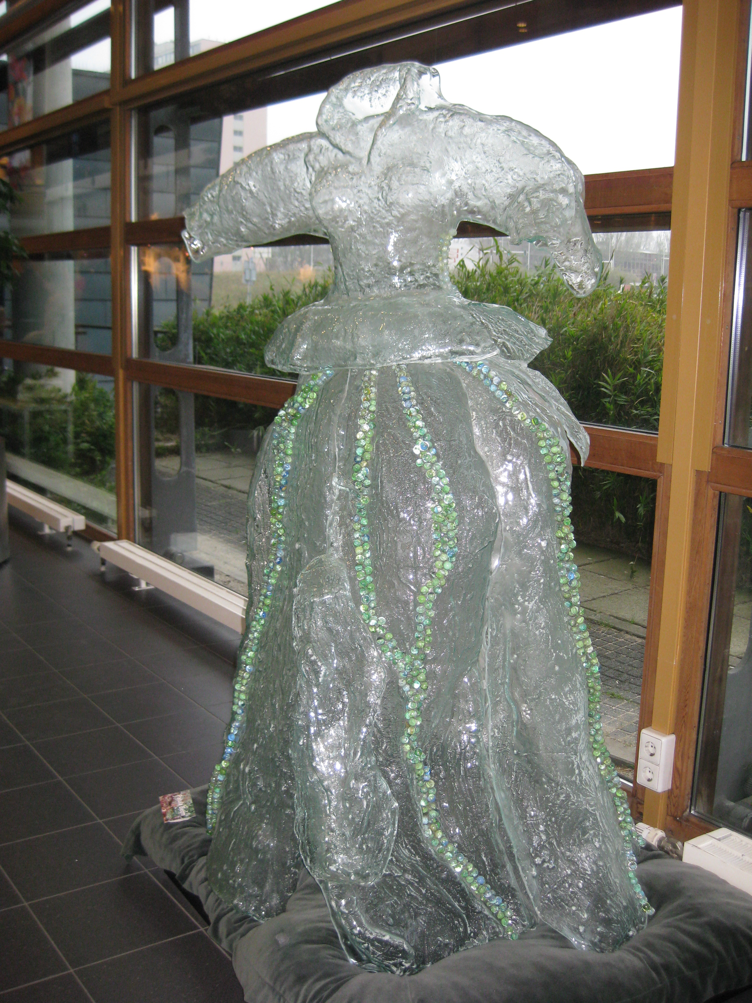 Gesmolten Glazen Jurk 1996, Patula Berm, in het Stadsdeelhuis, Buikslotermeerplein, Amsterdam-Noord